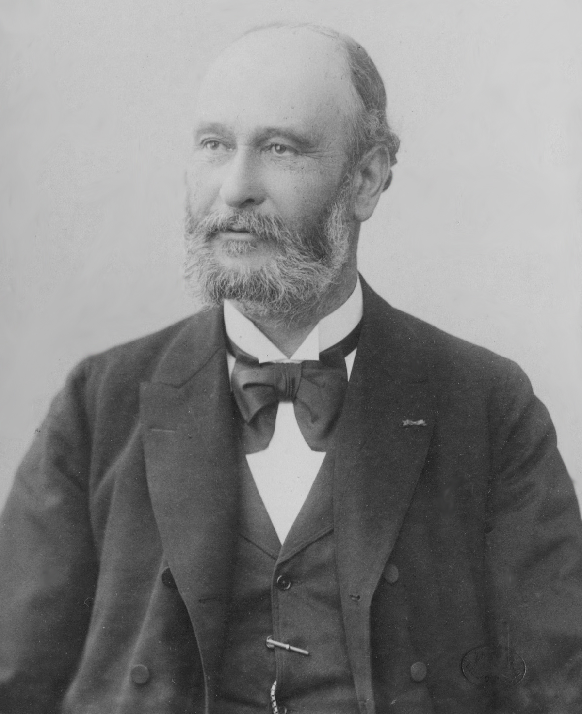 Portrait Emile Vidal